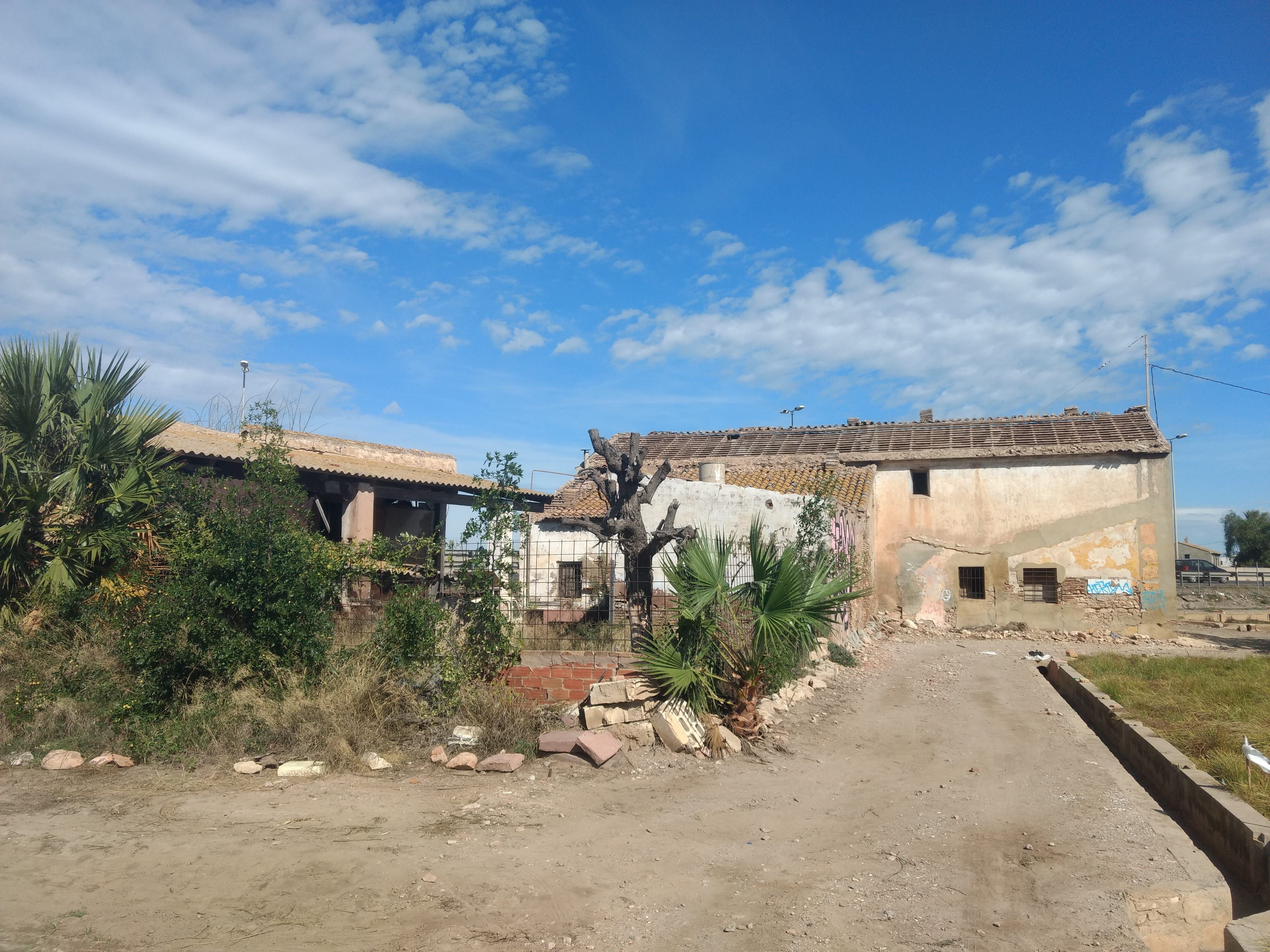 L'Alqueria de Bayarri el dia abans de ser enderrocada.